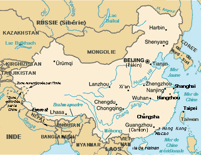 Importée depuis wiki anglais et traduite. Version 02 : modification